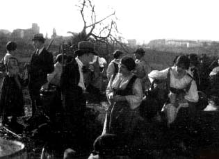 Fotogramma di Tresa, film muto del 1915, regia di Emilio Ghione (1879-1930), produz "Tiber Film", Roma, 1915